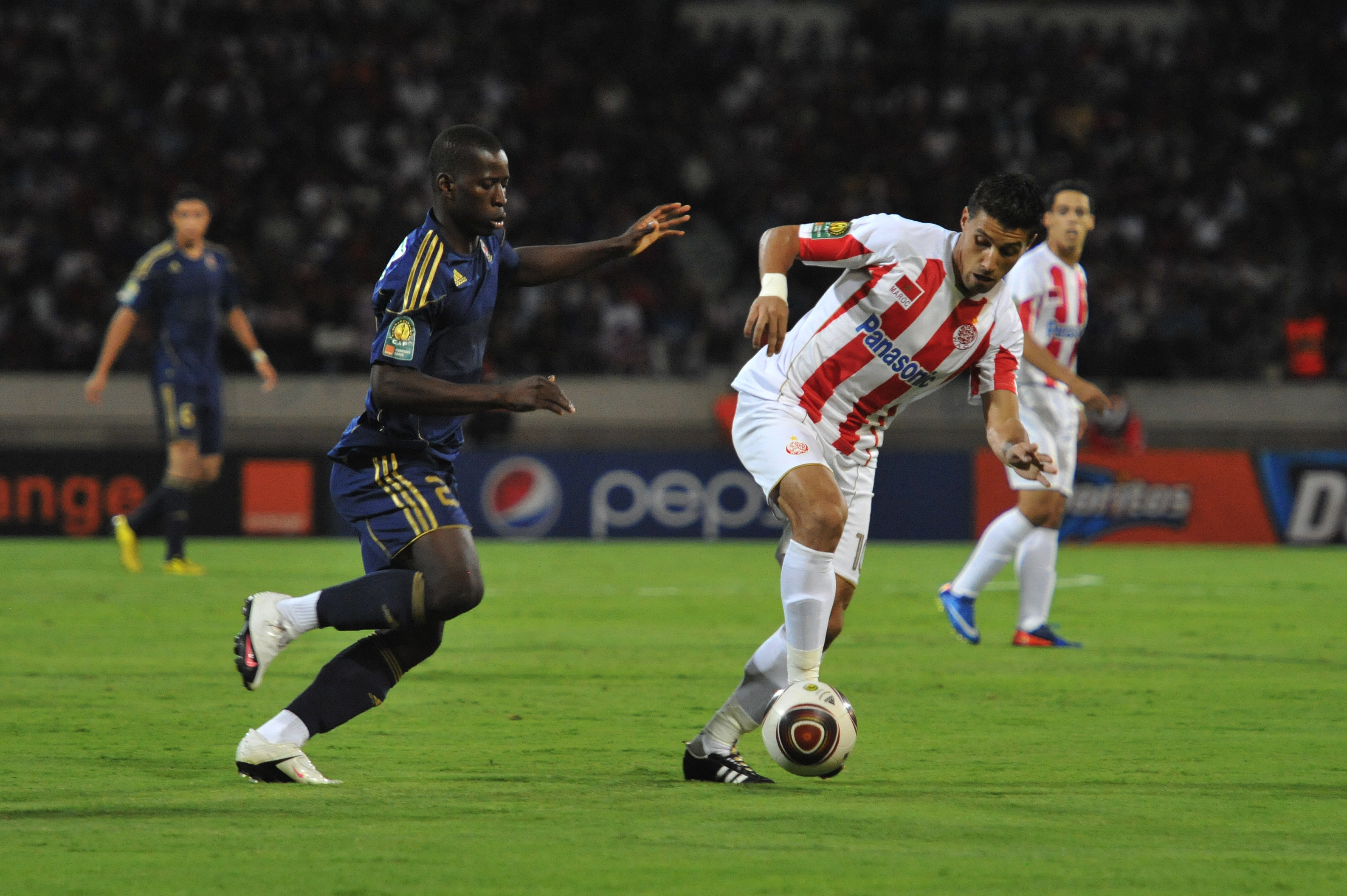 Match Wydad vs Al Ahly